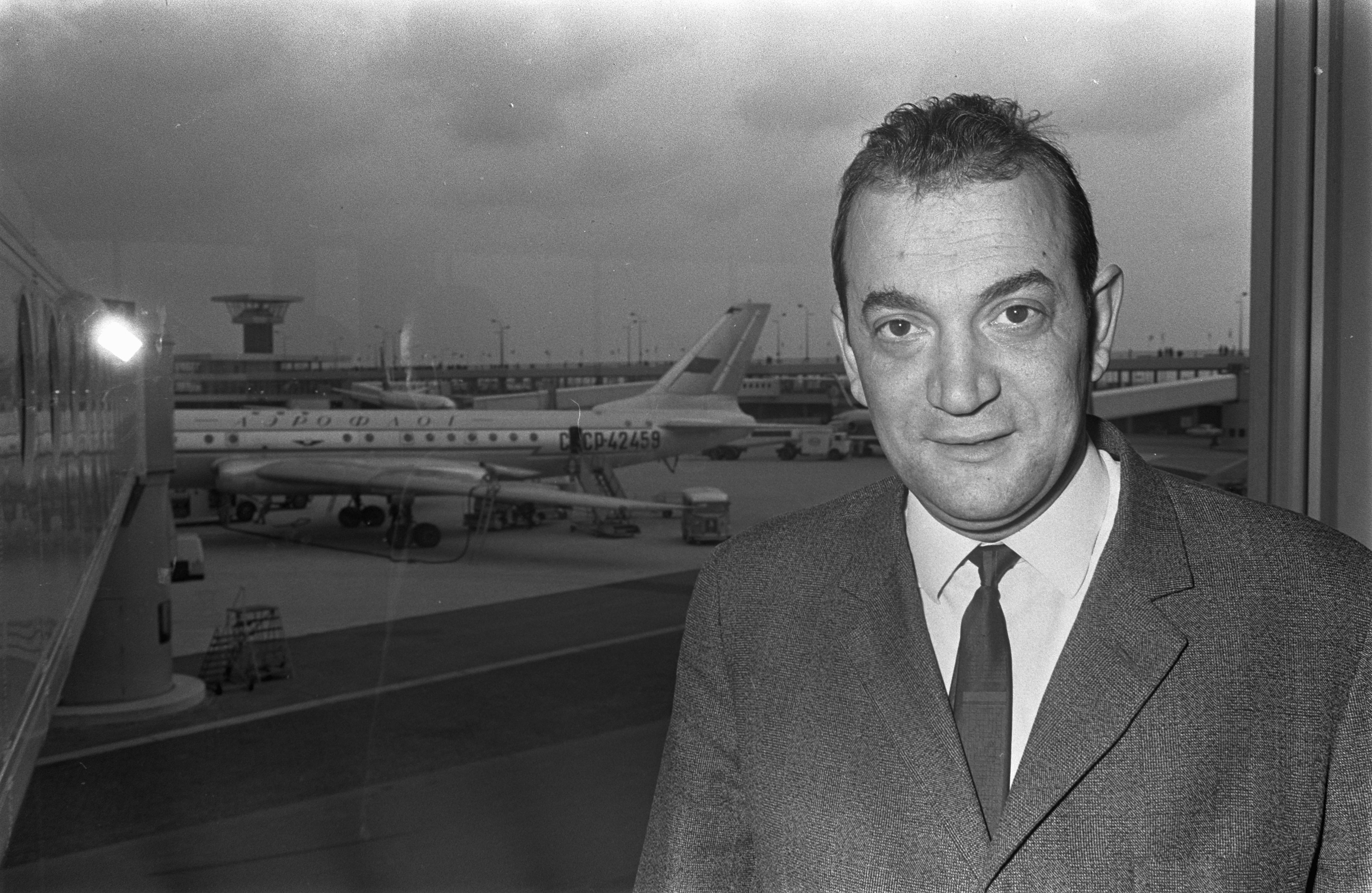 Collectie / Archief : Fotocollectie Anefo Reportage / Serie : [ onbekend ] Beschrijving : Aankomst Russische schaker Kortsjnoi op Schiphol Datum : 6 mei 1968 Trefwoorden : aankomsten, schakers Persoonsnaam : Kortsjnoi, Viktor Fotograaf : Koch, Eric / Anefo Auteursrechthebbende : Nationaal Archief Materiaalsoort : Negatief (zwart/wit) Nummer archiefinventaris : bekijk toegang 2.24.01.05 Bestanddeelnummer : 921-3246